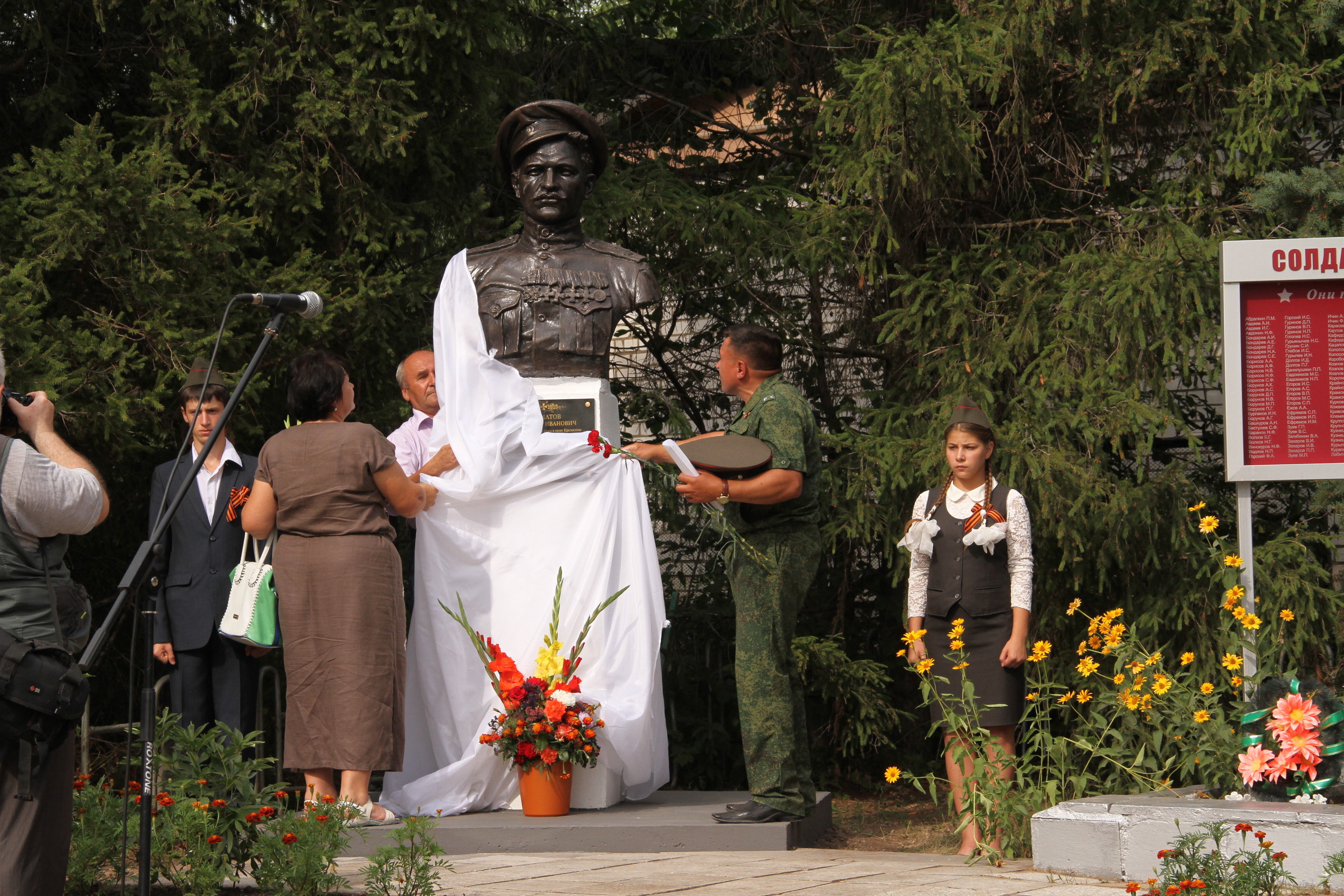 Открывают памятник глава администрации муниципального образования «Прибрежненское сельское поселение» Юрий Мощенко, руководитель межрегиональных Российских и международных программ Регионального Отделения Московского Международного Фонда Содействия ЮНЕСКО в Поволжье «100-летие Первой Мировой войны, памяти солдат и офицеров Русской императорской армии» Дмитрий Борисов и Виталий Ворохобин, родственник Владимира Ивановича Долматова.